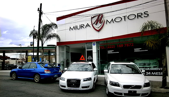 Furlan: Agencia de autos seminuevos y servicio premium en Puebla.